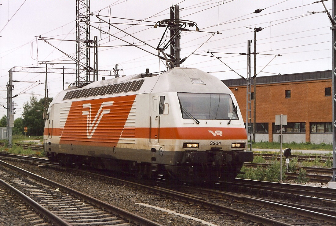 Die elektrische Lokomotive Sr2 3204 der VR, aufgenommen im Juni 2001 in Turku, durch S. Hinni (eigenes Bild).